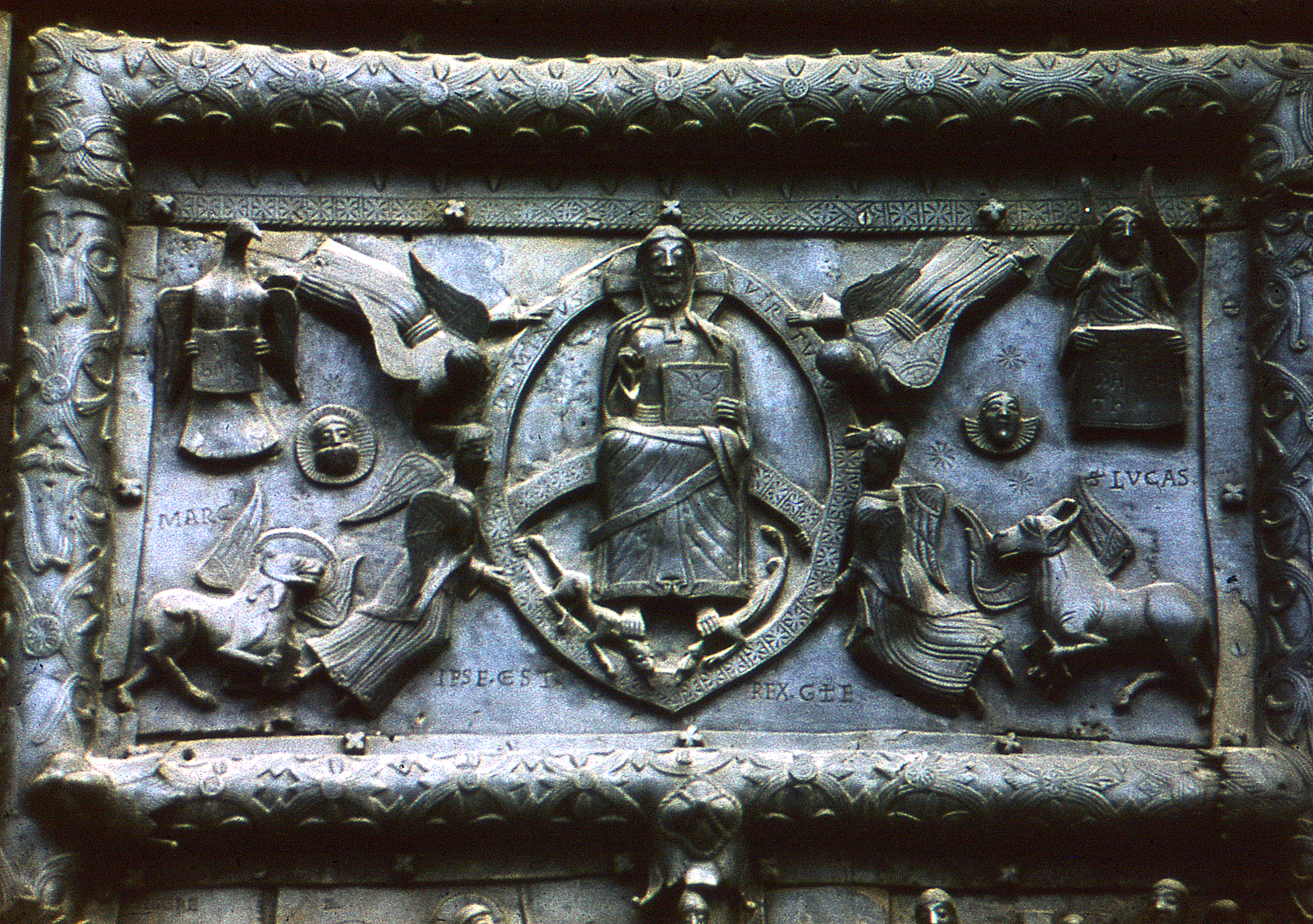 Сигтунские ворота (деталь 2)